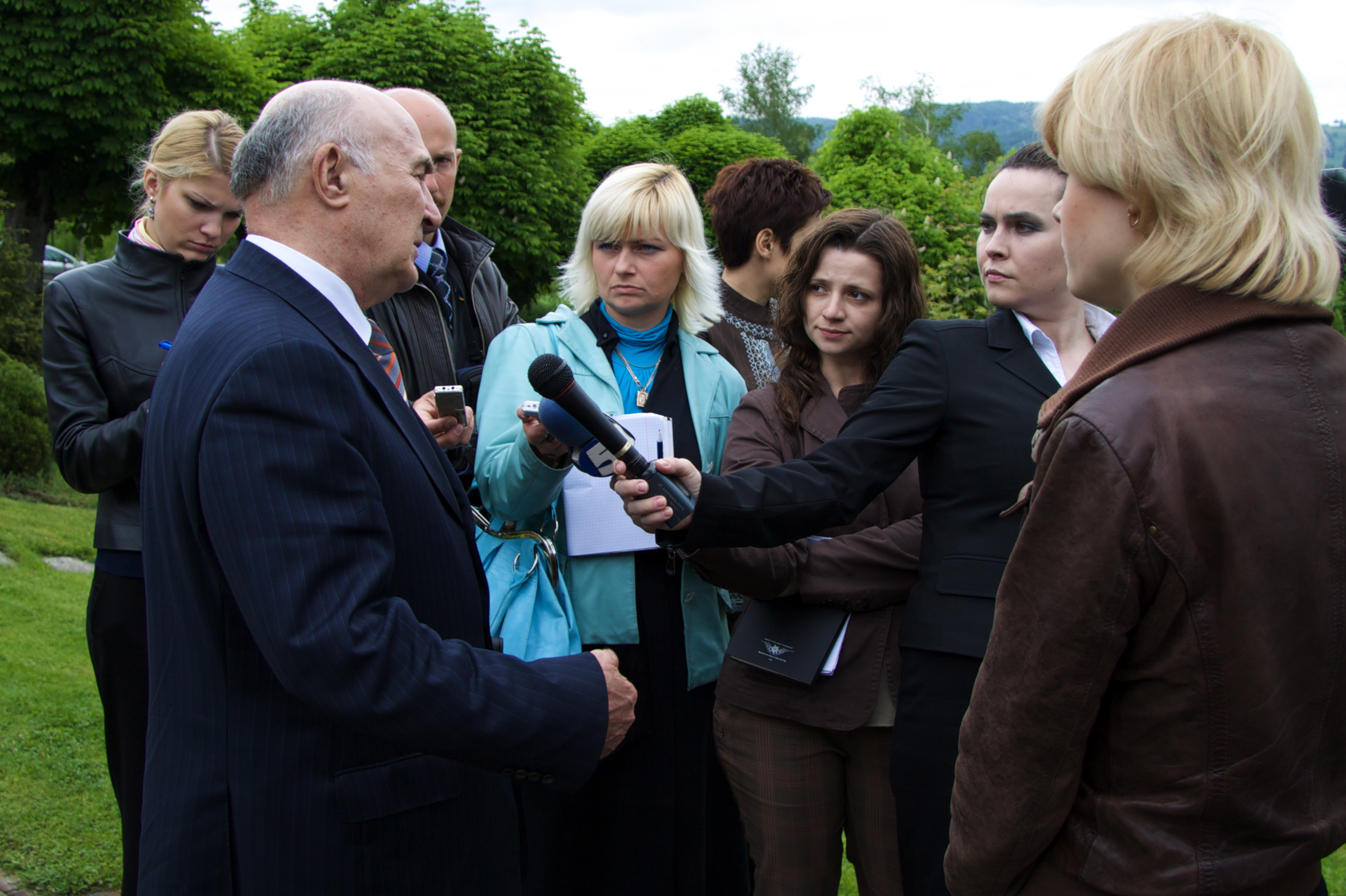 Journalisten von Rundfunk und Fernsehen sowie der Printmedien beim Interview mit einem ukrainischen Politiker.